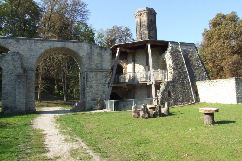 Museumsbark Rüdersdorf: Rumfordofen Fotograf: Harald Rossa Datum: 3. Oktober 2006 Höher aufgelöste Version ist verfügbar